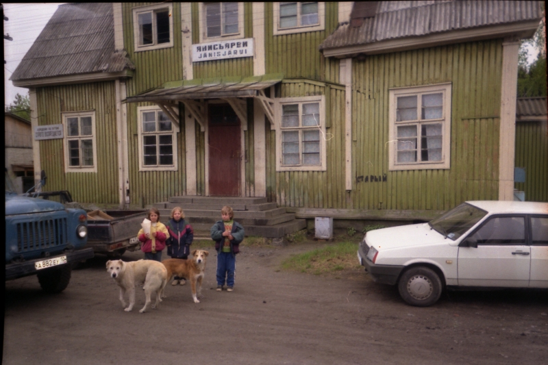 Янисъярви